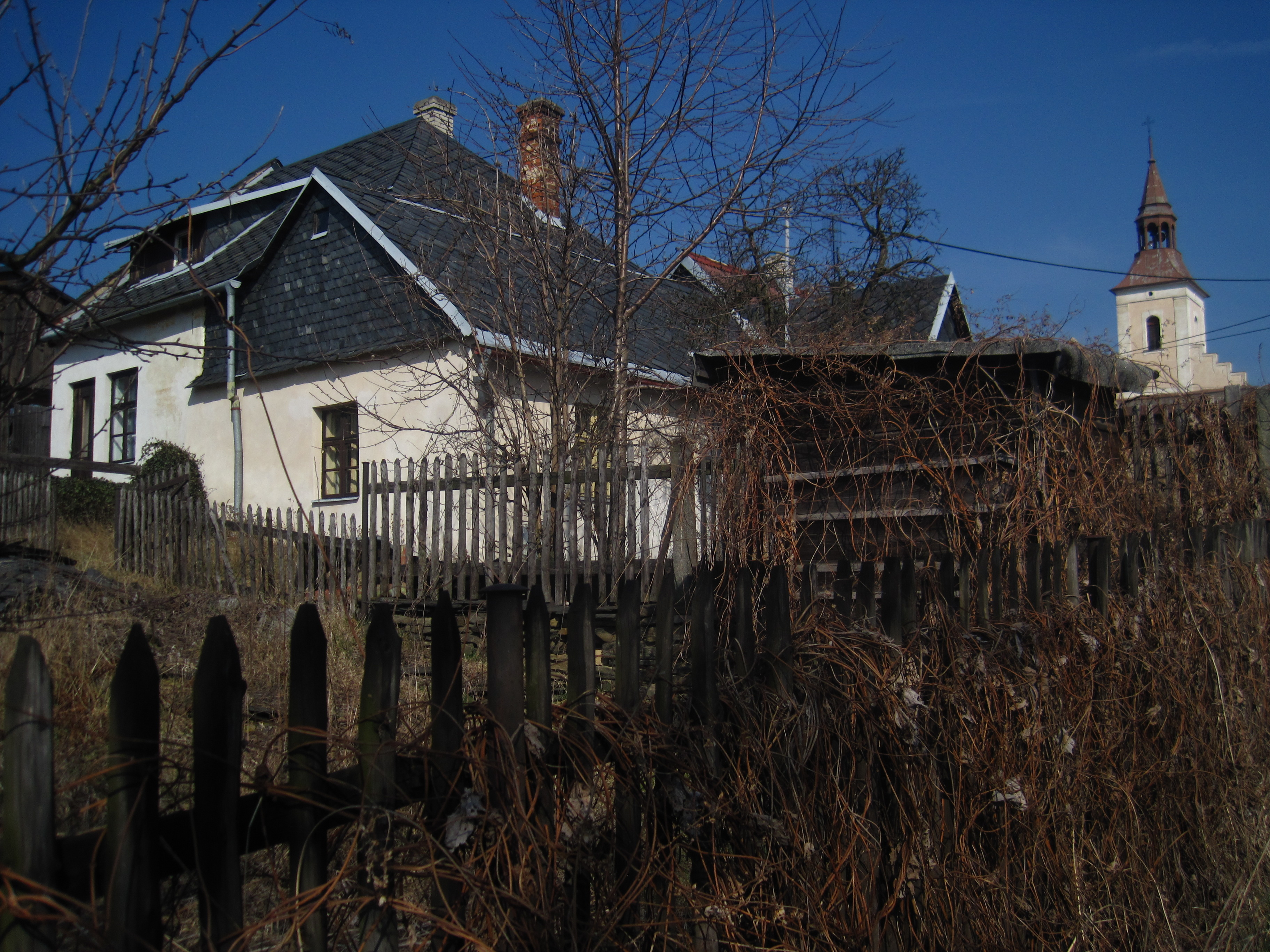 Bratříkovice u Opavy - lidová architektura čp. 25